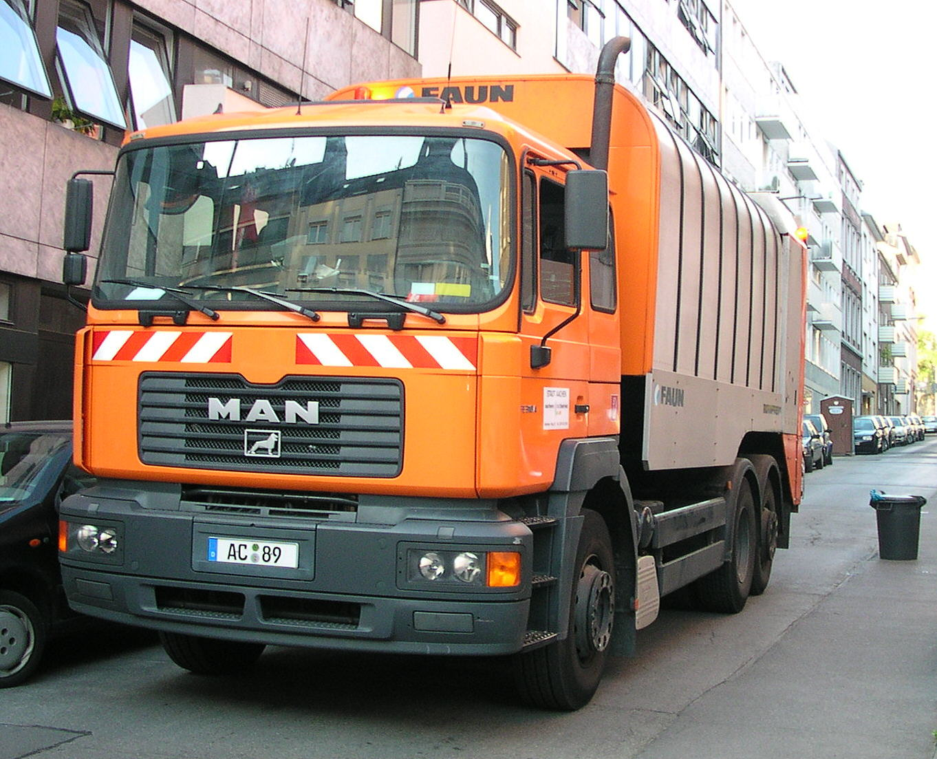 MAN-Müllwagen mit Faun-Aufbau in Aachen